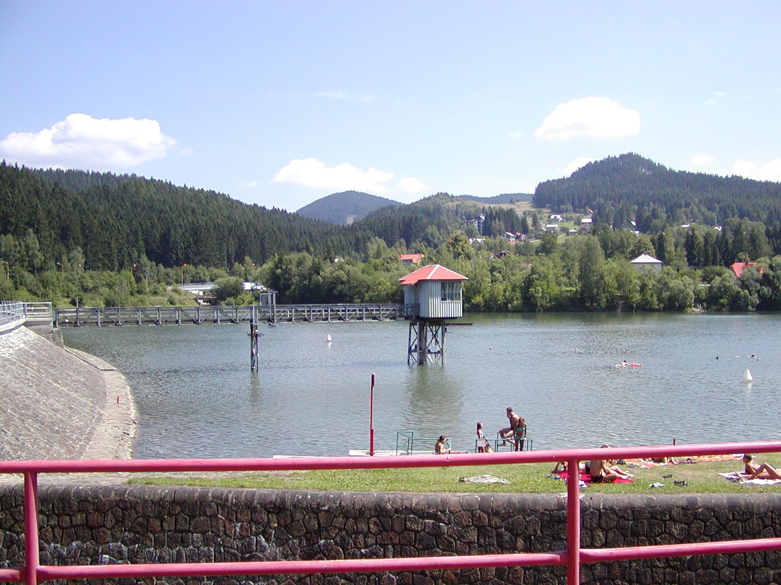 Přehrada Horní Bečva